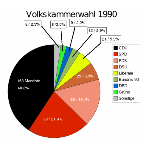 Diagramm: Ergebnis der Volkskammerwahl 1990